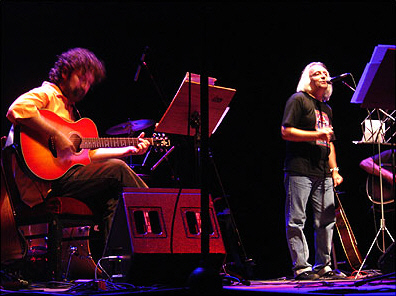 Fotografía de los cantantes uruguayos Walter Bordoni y Gastón Rodríguez Aroztegui en el marco de los espectáculos Aguafuertes Montevideanas. Fotografía tomada por Luis Izzi para el sitio